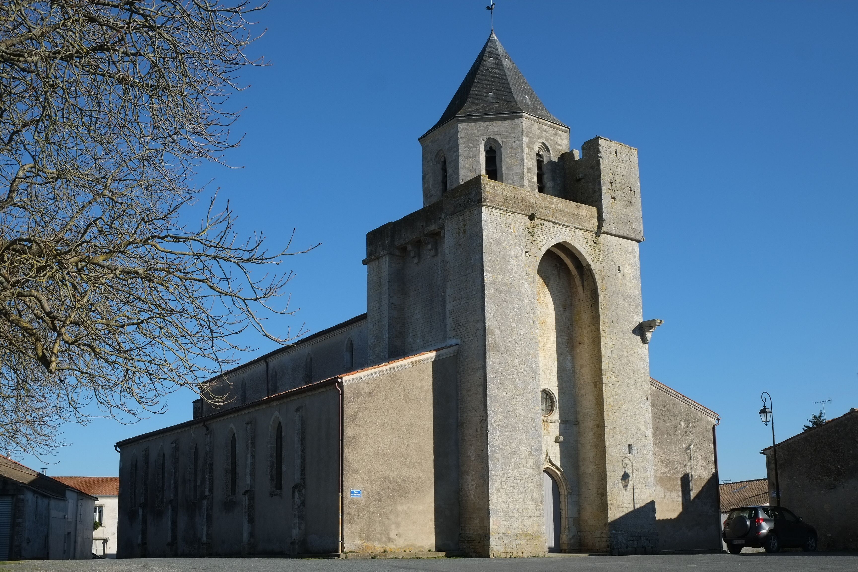 Église Notre-Dame de l'Assomption Thairé Charente-Maritime France